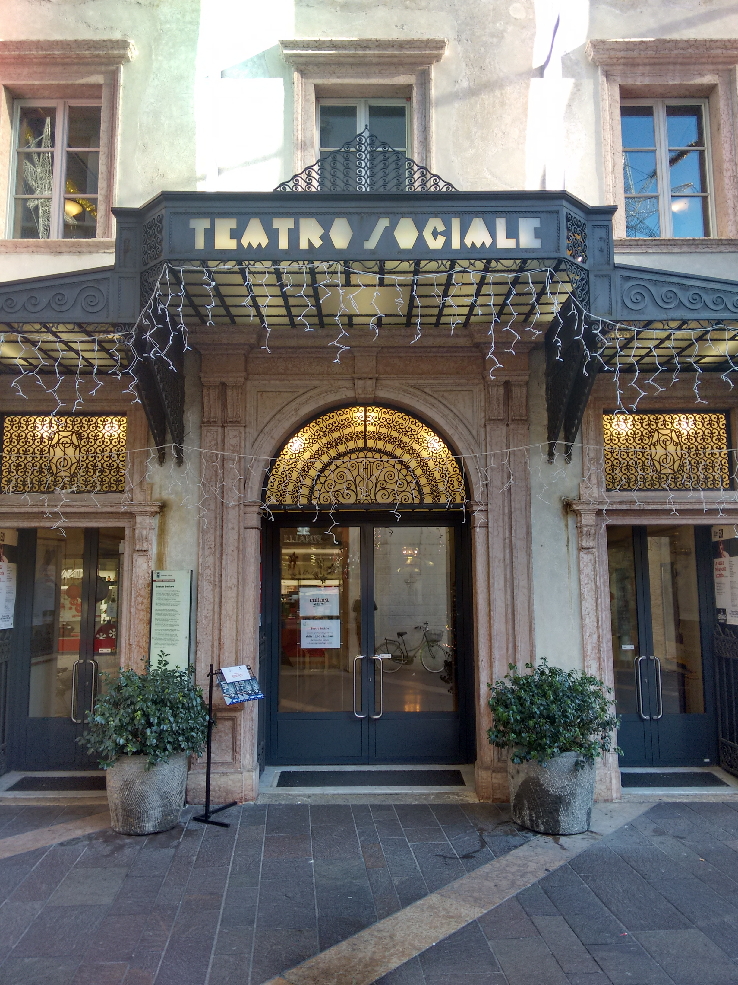 Ingresso del Teatro Sociale di Trento